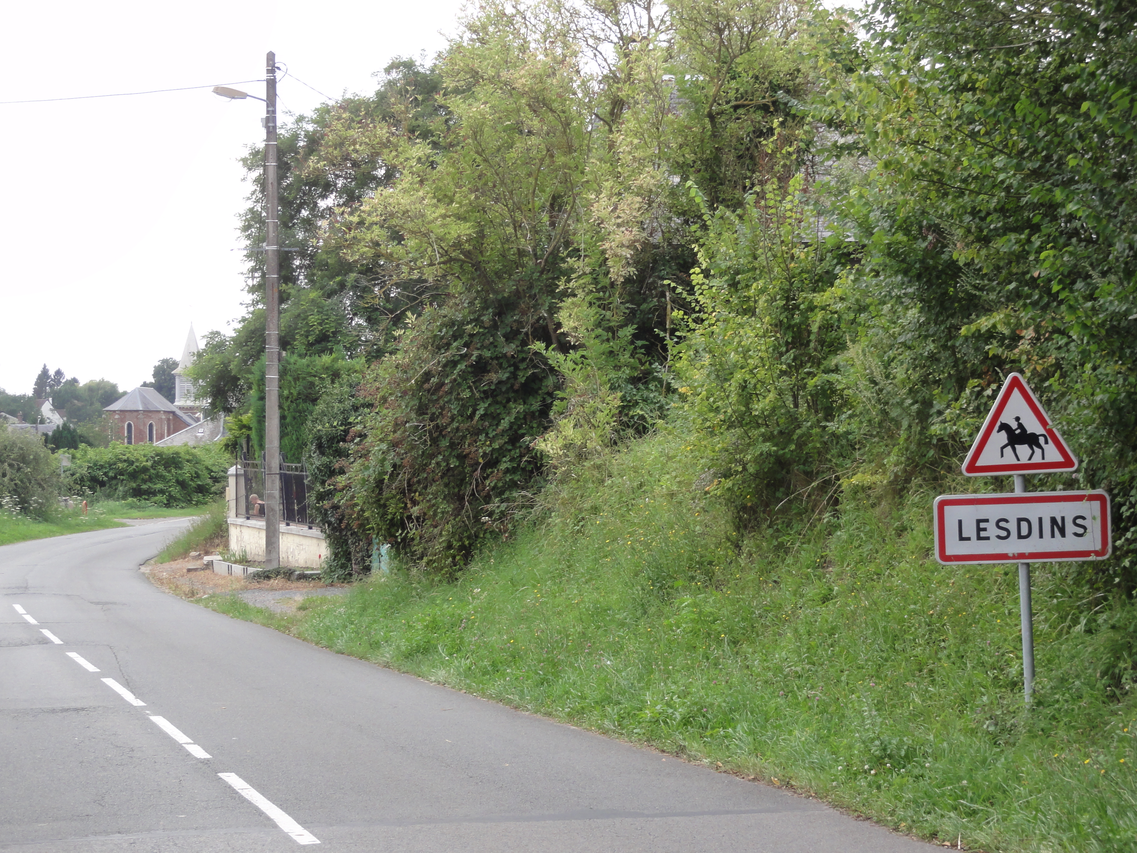 Lesdins (Aisne) city limit sign